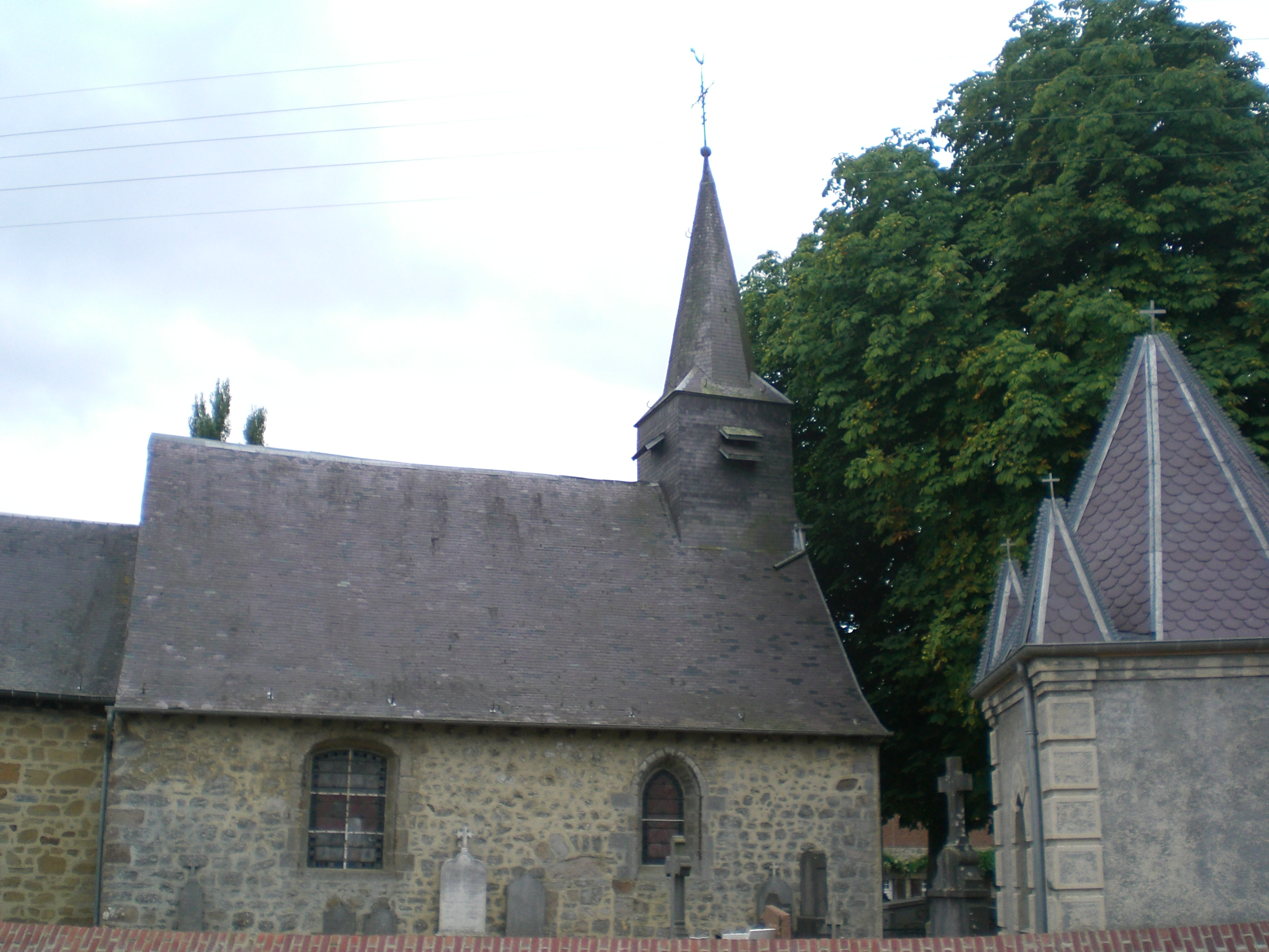 eglise st Hiltrude Wattignies-la-Victoire nord france